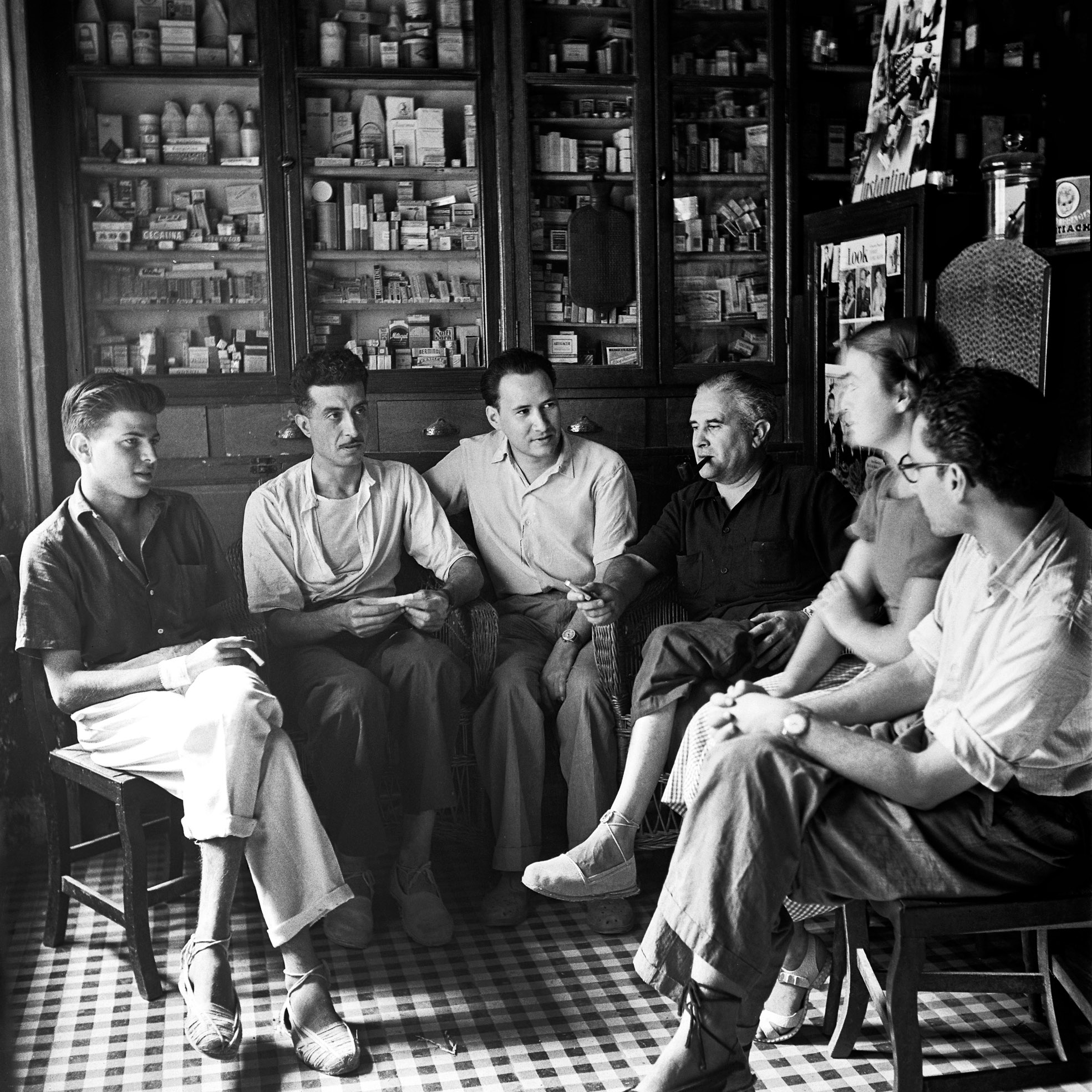 Fotografia feta per Joaquim Fort de Ribot